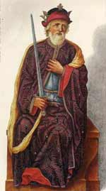 Alfonso II de Asturias en el Libro de Retratos de los Reyes del Alcázar de Segovia.